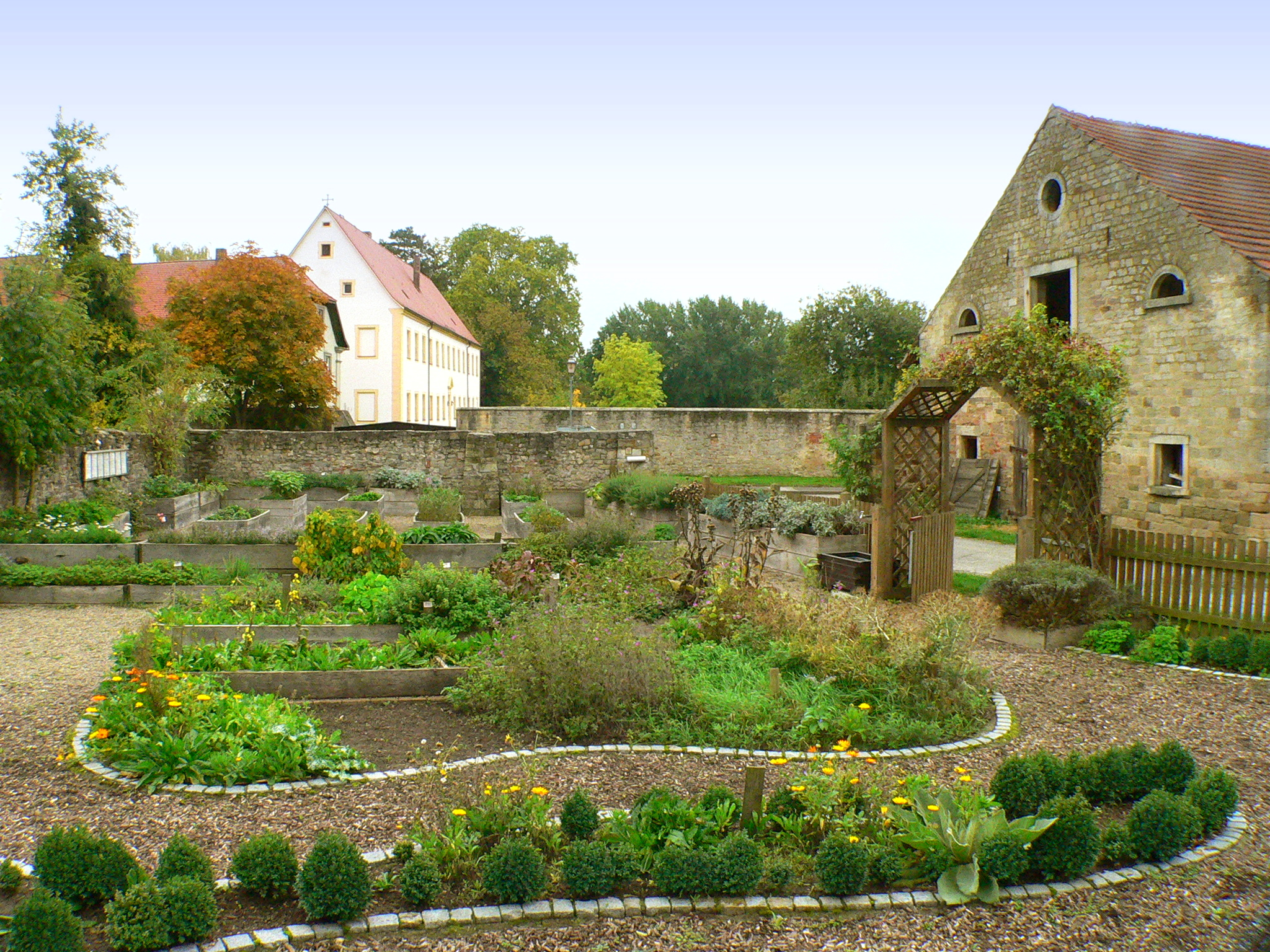 Kloster Obertheres, Klostergarten